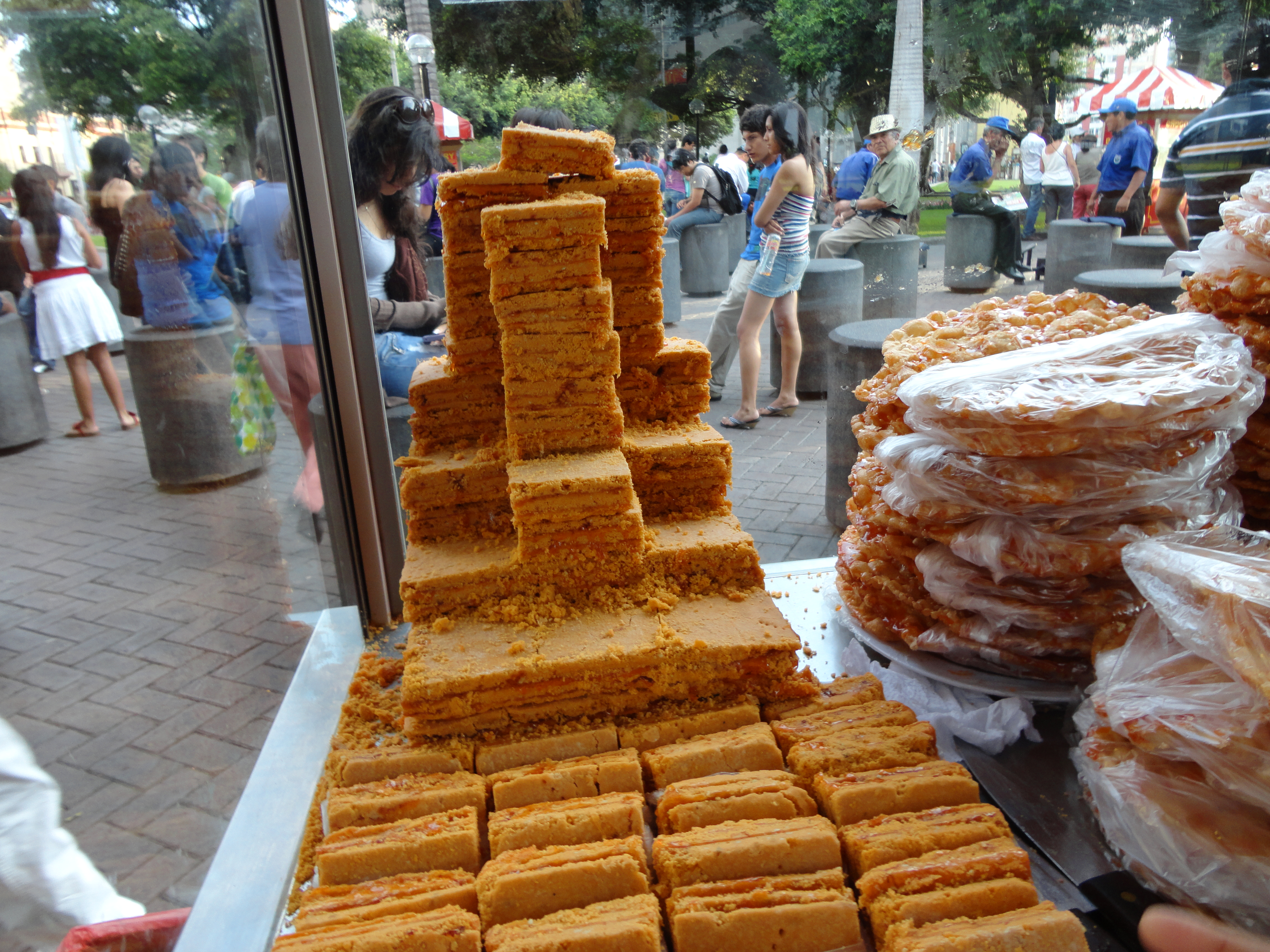 Chumbeque es el nombre mochica del turrón de Piura, en el norte peruano, consumido desde hace siglos por varias generaciones.